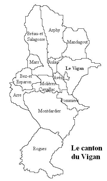 Le canton du Vigan Image personnelle